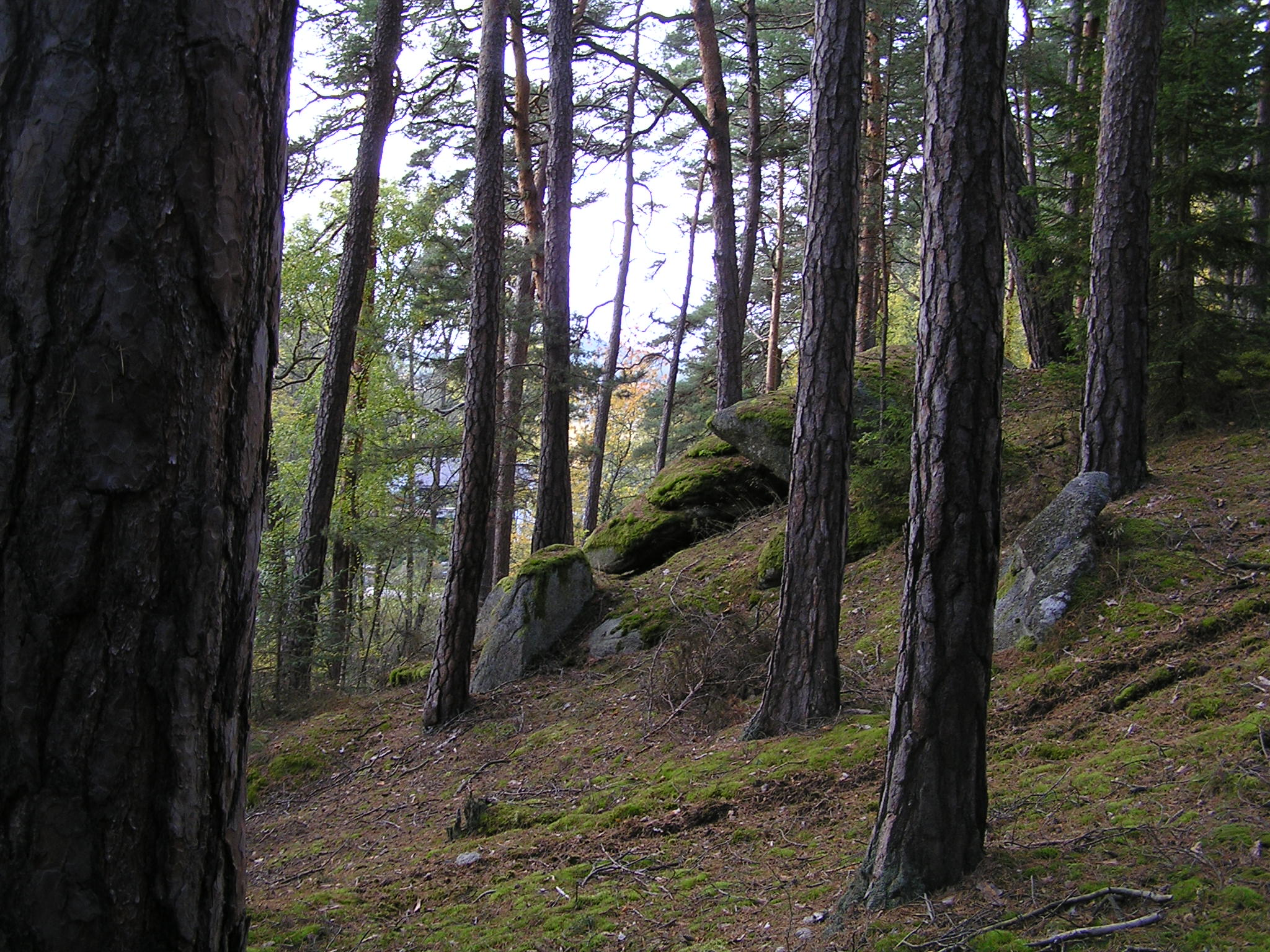 PP Valcha